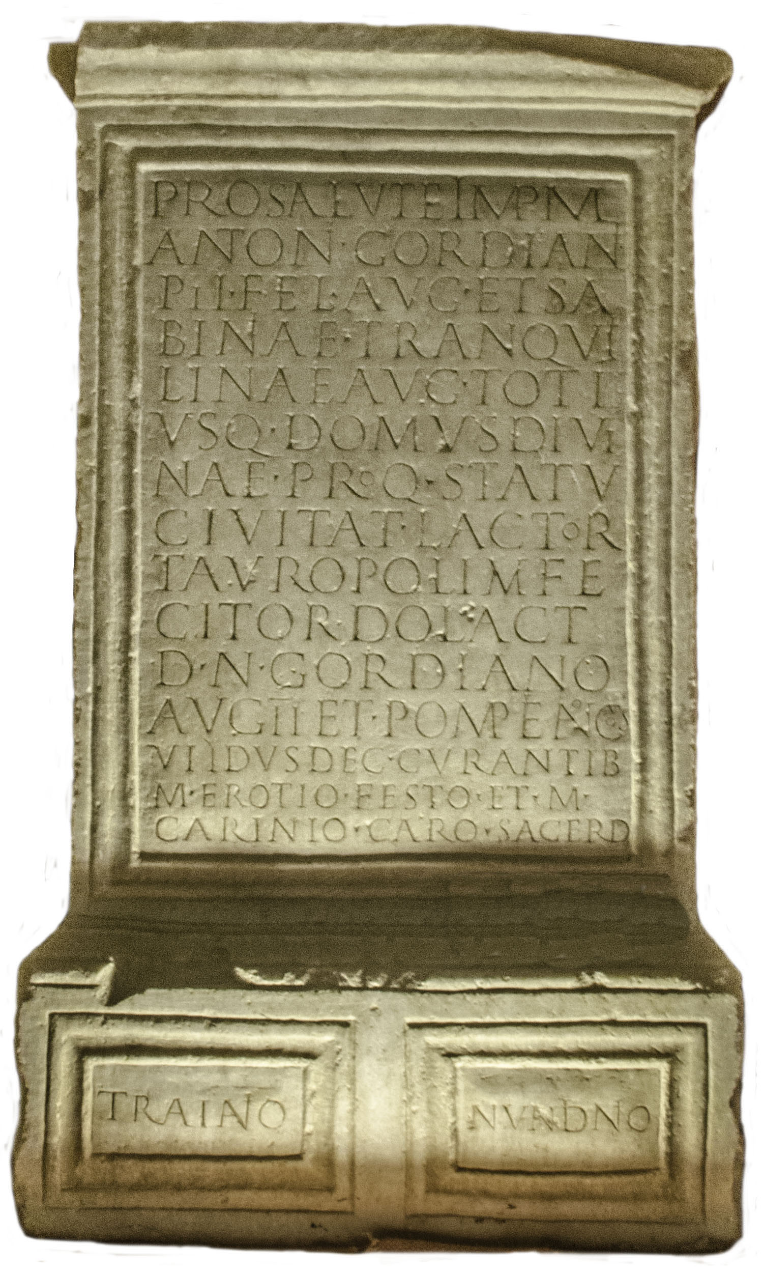 Autel taurobolique pour le salut de la famille impériale, offert par le conseil des Lactorates. Musée Eugène-Camoreyt de Lectoure, Gers, France.